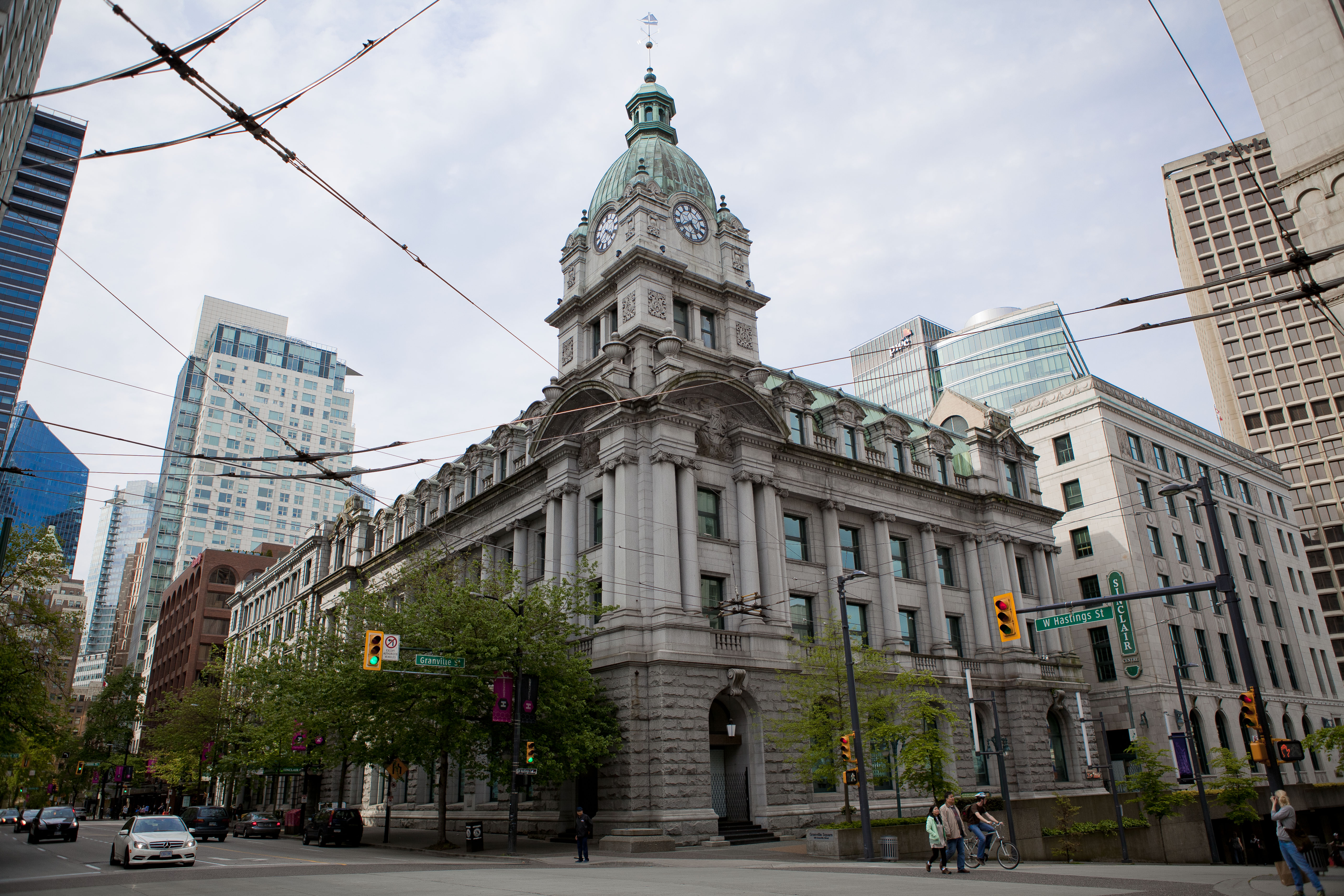 Sinclair Centre